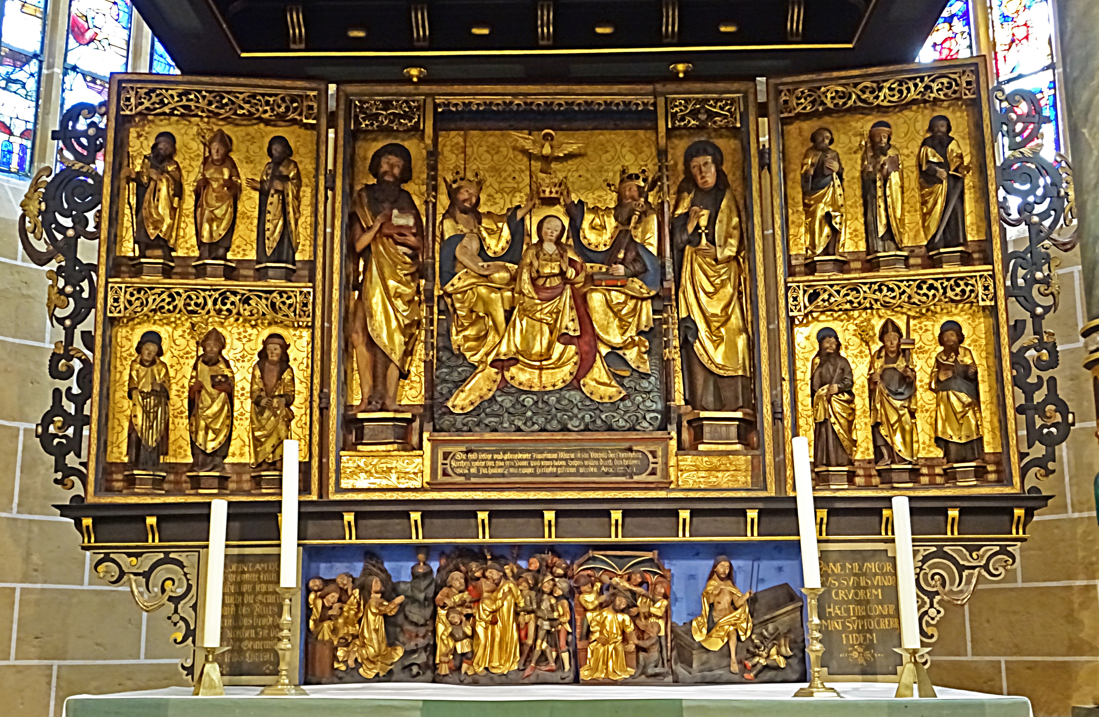 Spätgotischer Schnitzaltar (um 1525, Meister des Molschlebener Altars) in der Marienkirche (Mühlhausen)